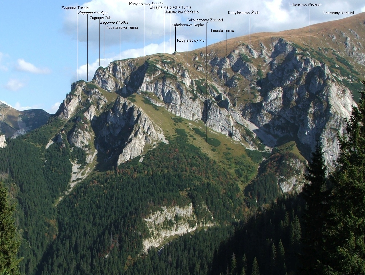 Widok z grzbietu Ciemniaka